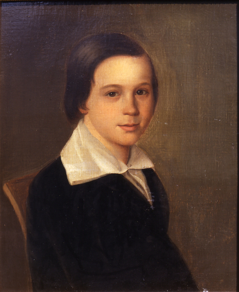 Српски (ћирилица): Димитрије Караџић, српски официр, професор Војне академије